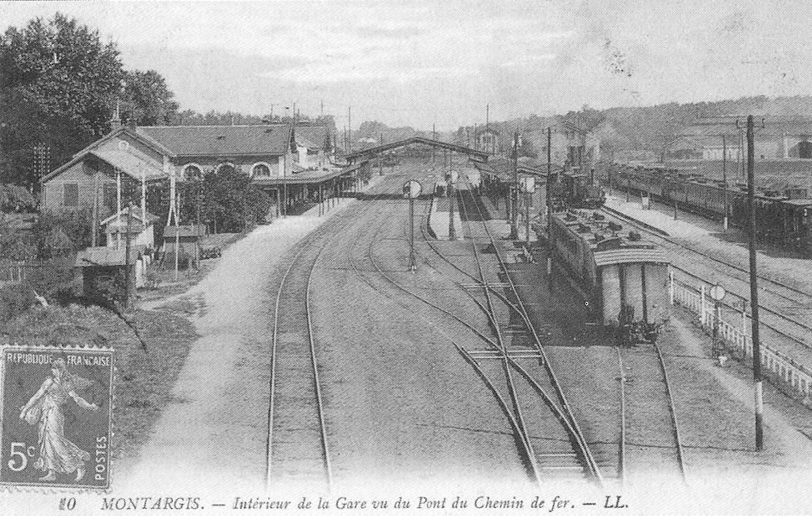 Gare de Montargis (Loiret, France), au début du XX° siècle. Carte postale ancienne éditée par LL, n° 10.